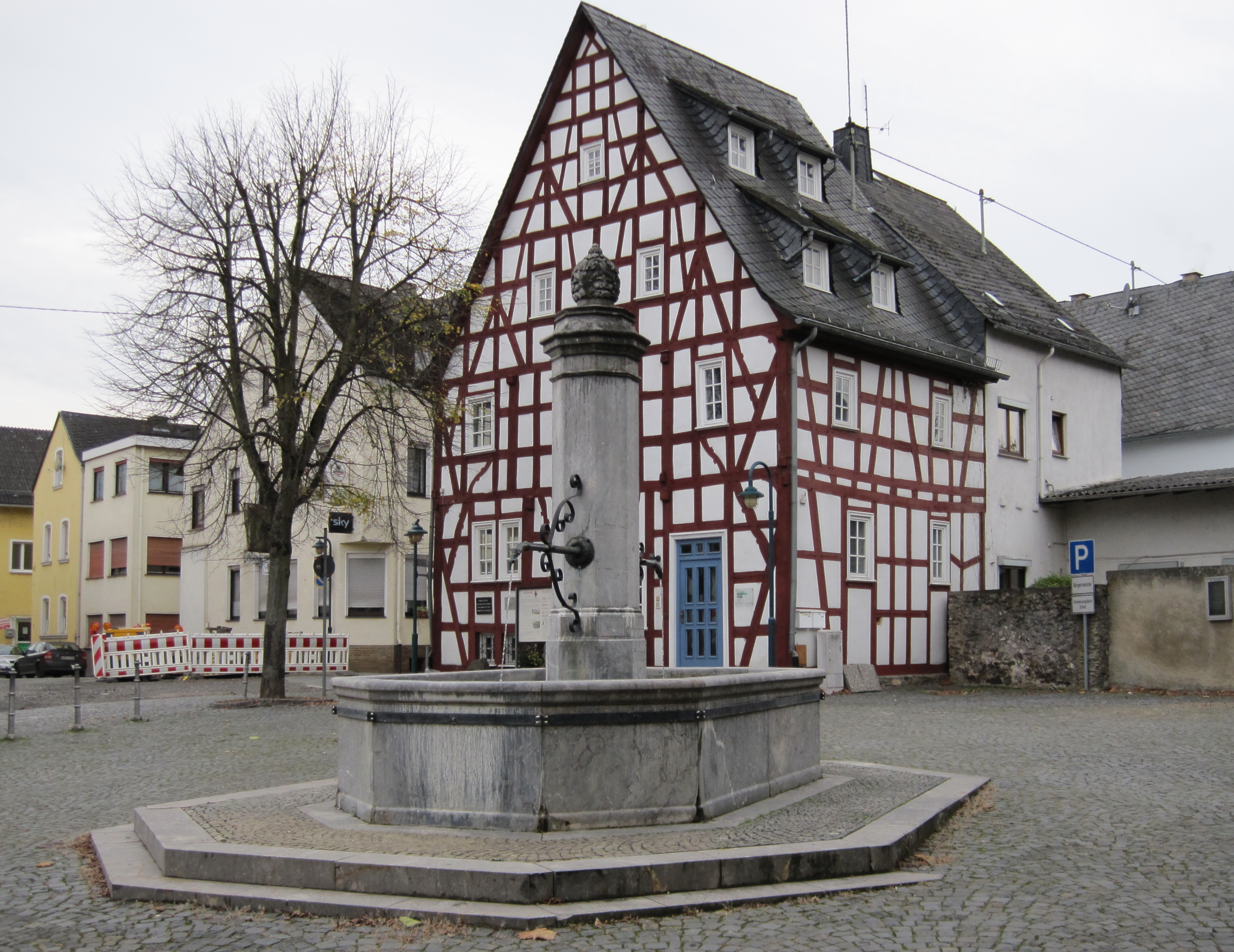 Brunnen aus Lahnmarmor am Rathauseck, Weilburger Straße, Villmar. 1827. Achteckiges Becken, Säule mit Krone, Eichelknauf und zwei Speiröhren. Im Hintergrund Haus Peter-Paul-Straße 39–41, bis 2015 Standort des alten Lahn-Marmor-Museums.